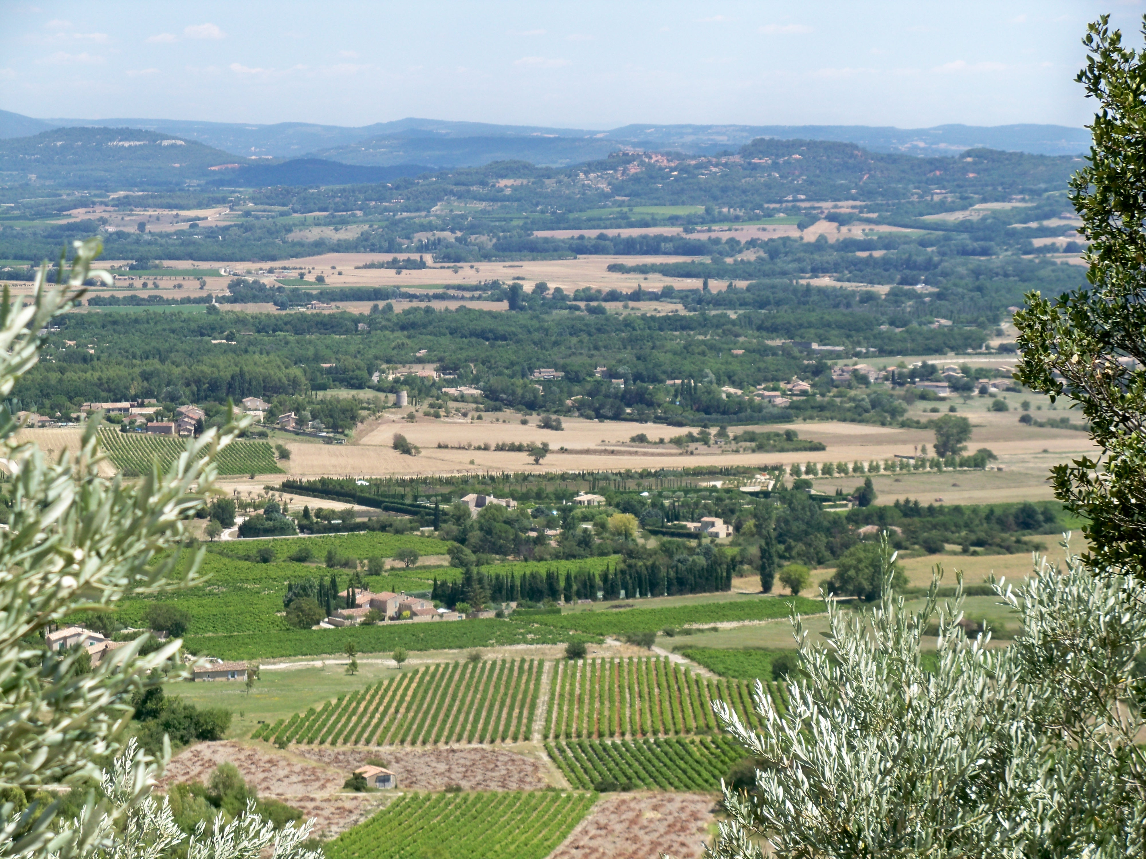 Plaine du calavon, vue depuis Oppède le Vieux, Vaucluse, France